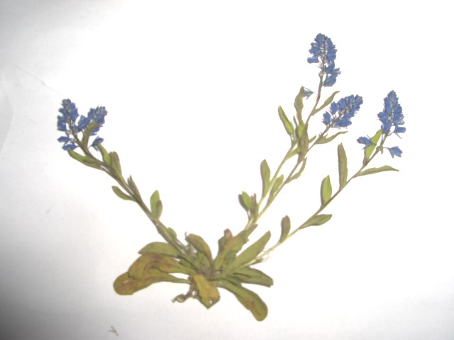 Viron Saarenmaan Pangan jyrkänteellä kasvanut Polygala amarella